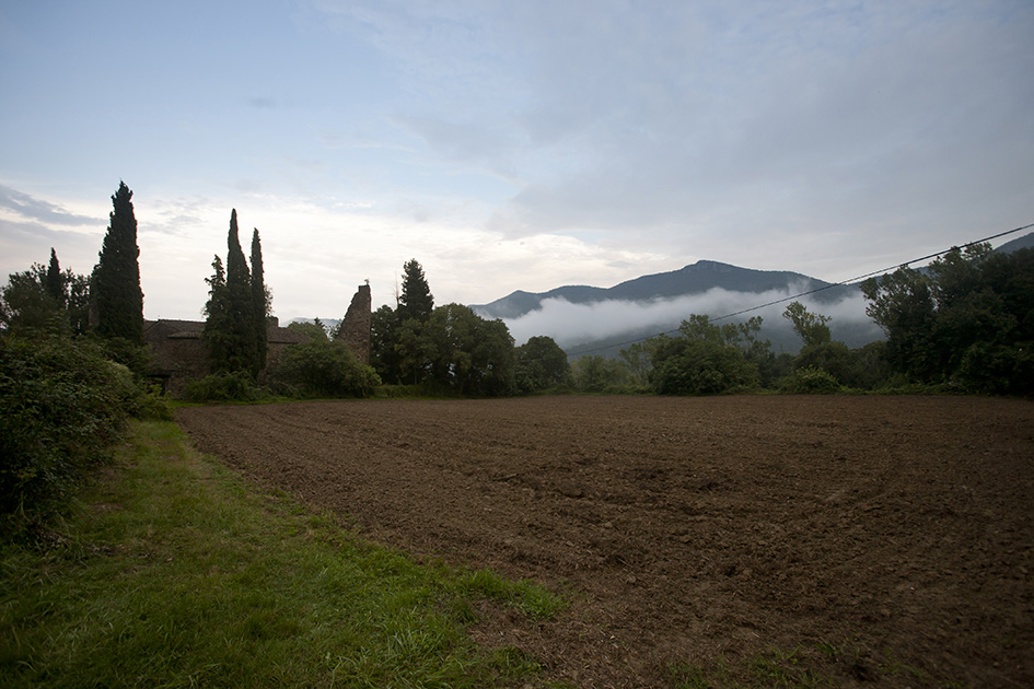 Castell de Falgons i entorn des del cantó oest